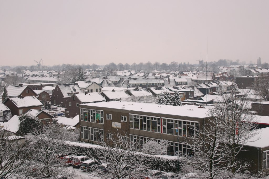 Veenendaal gezien vanaf een flat in het Prins Willem Alexander park (kijkrichting NO). Op de achtergrond zijn de twee molens van Veenendaal te zien, de Vriendschap (volgens mij links) en de Nieuwe Molen (volgens mij rechts).